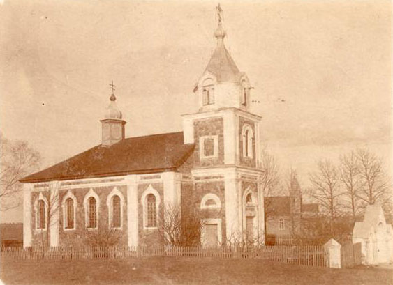 Беларуская (тарашкевіца): Груздава